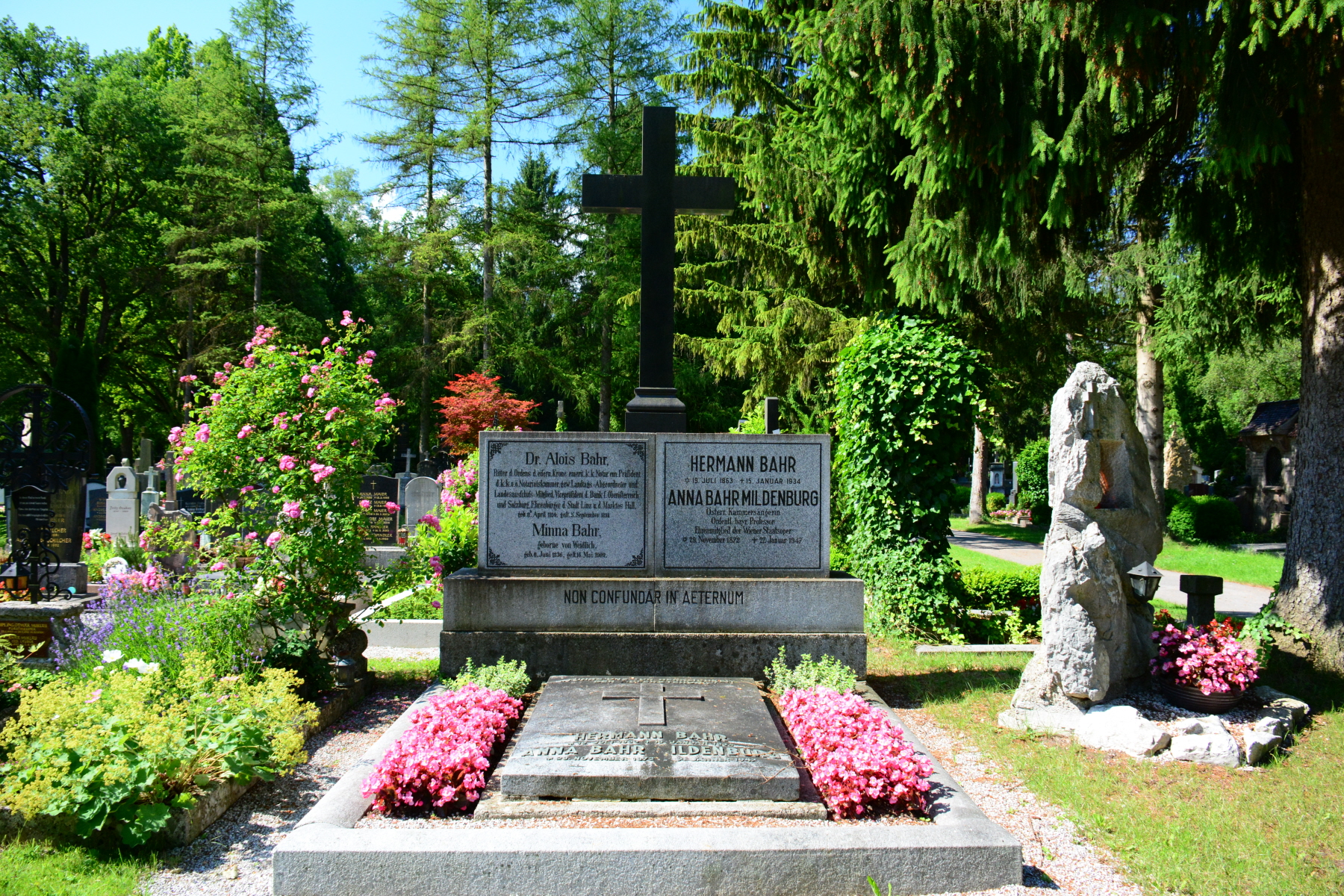 Grab von Alois Bahr, Hermann Bahr und Anna Bahr-Mildenburgauf dem Kommunalfriedhof von Salzburg